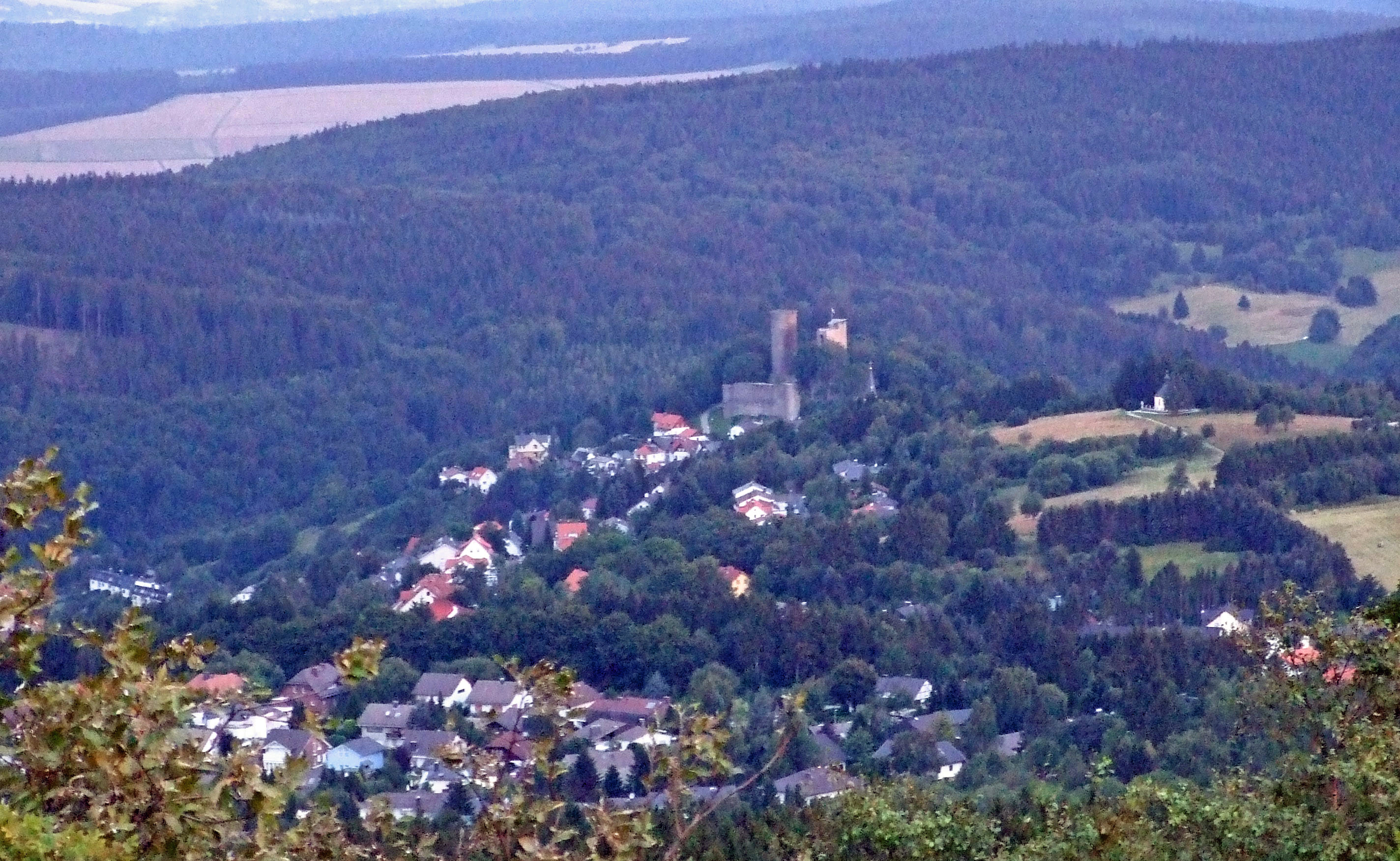 Oberreifenberg im Hintertaunus mit Burgruine